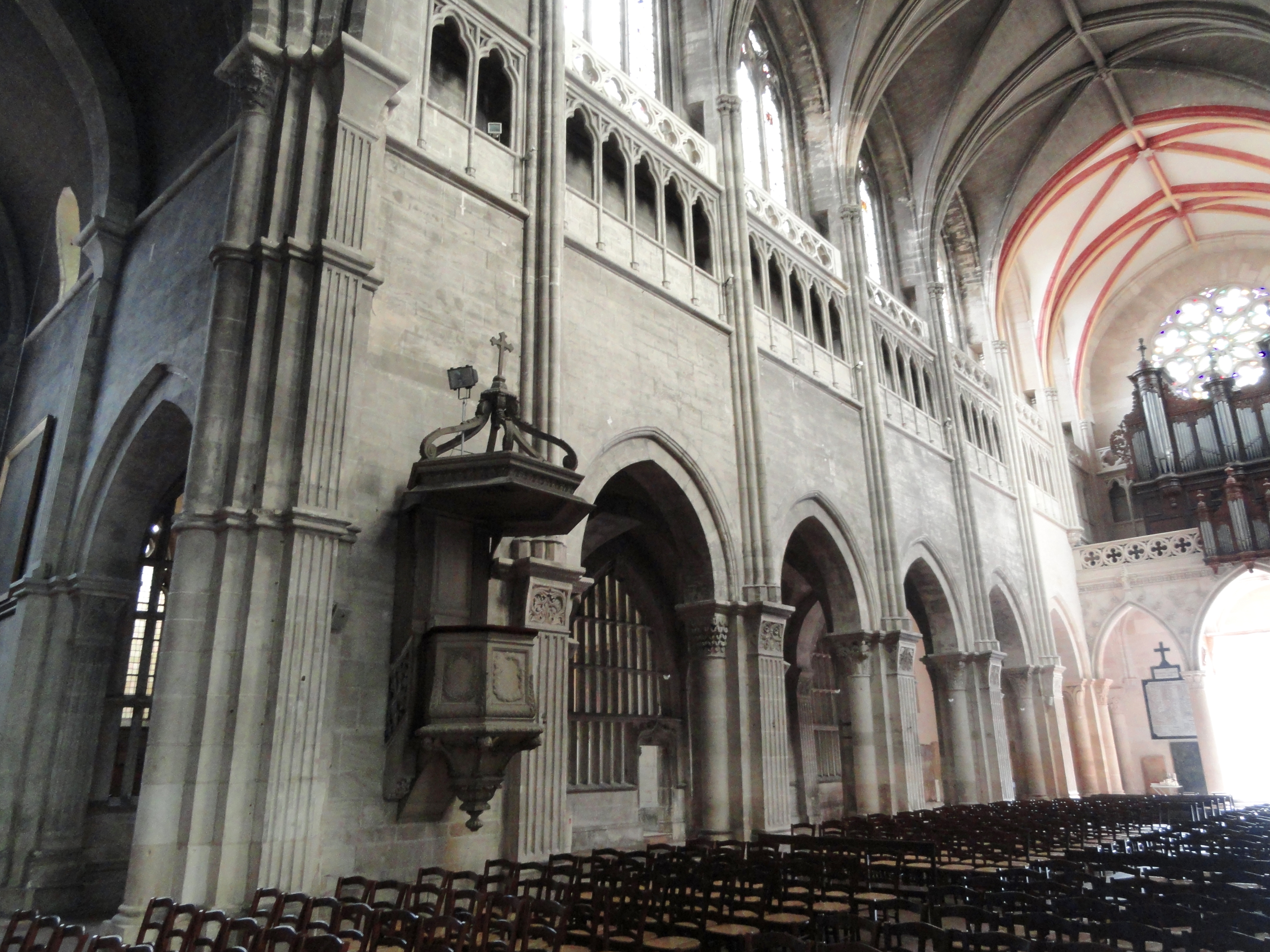 Cathédrale Saint-Vincent de Chalon-sur-Saône, Chalon-sur-Saône, Saône-et-Loire, France.